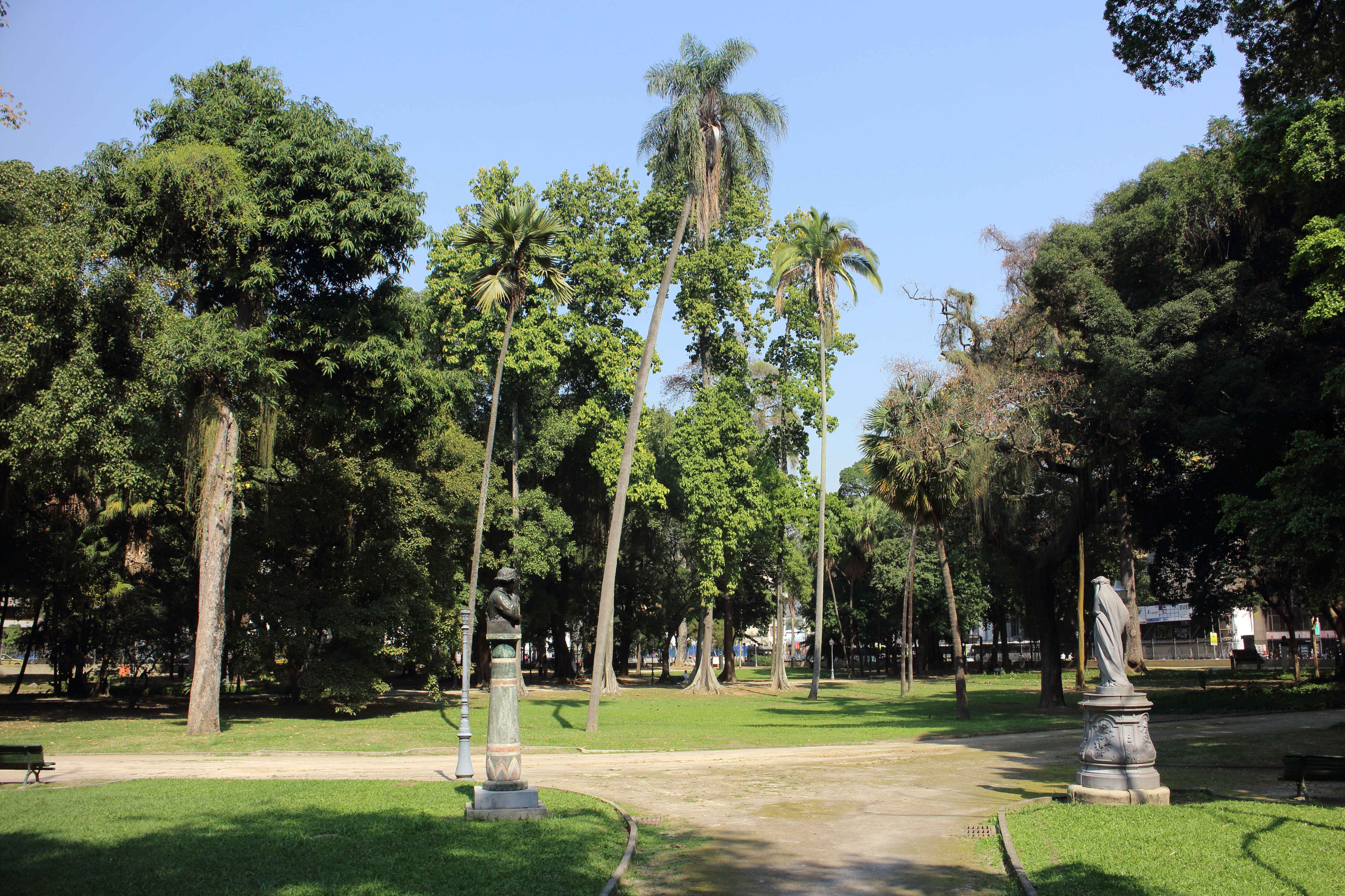 Passeio Público do Rio de Janeiro